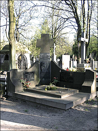 Helena Kurcyusz grób na Powązkach